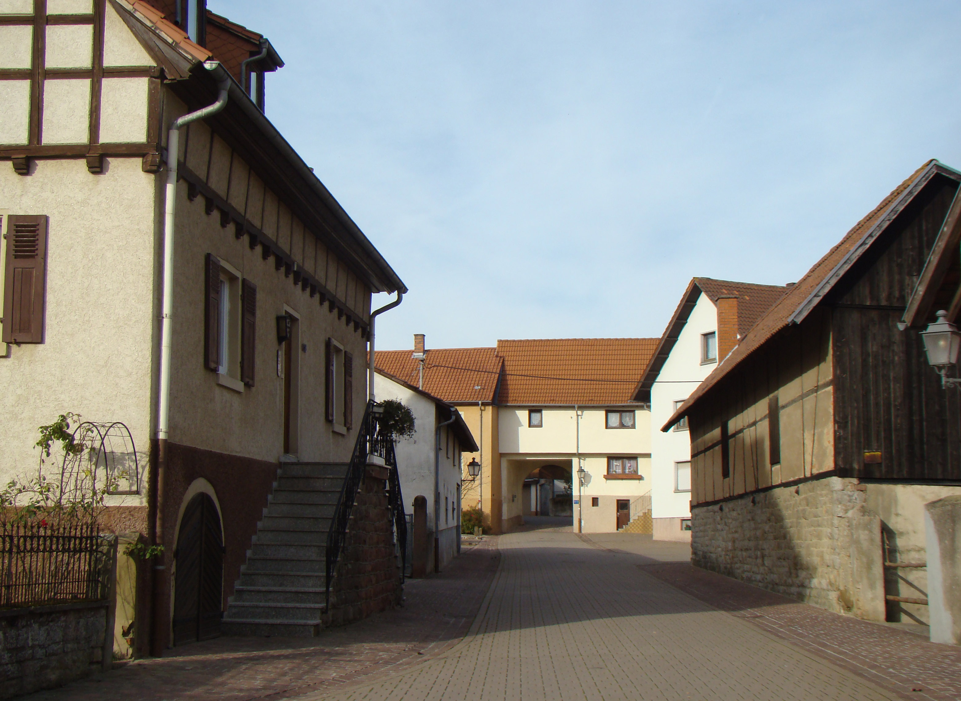 Kloster Lobenfeld, Klosterhof, Blick zum Klostertor